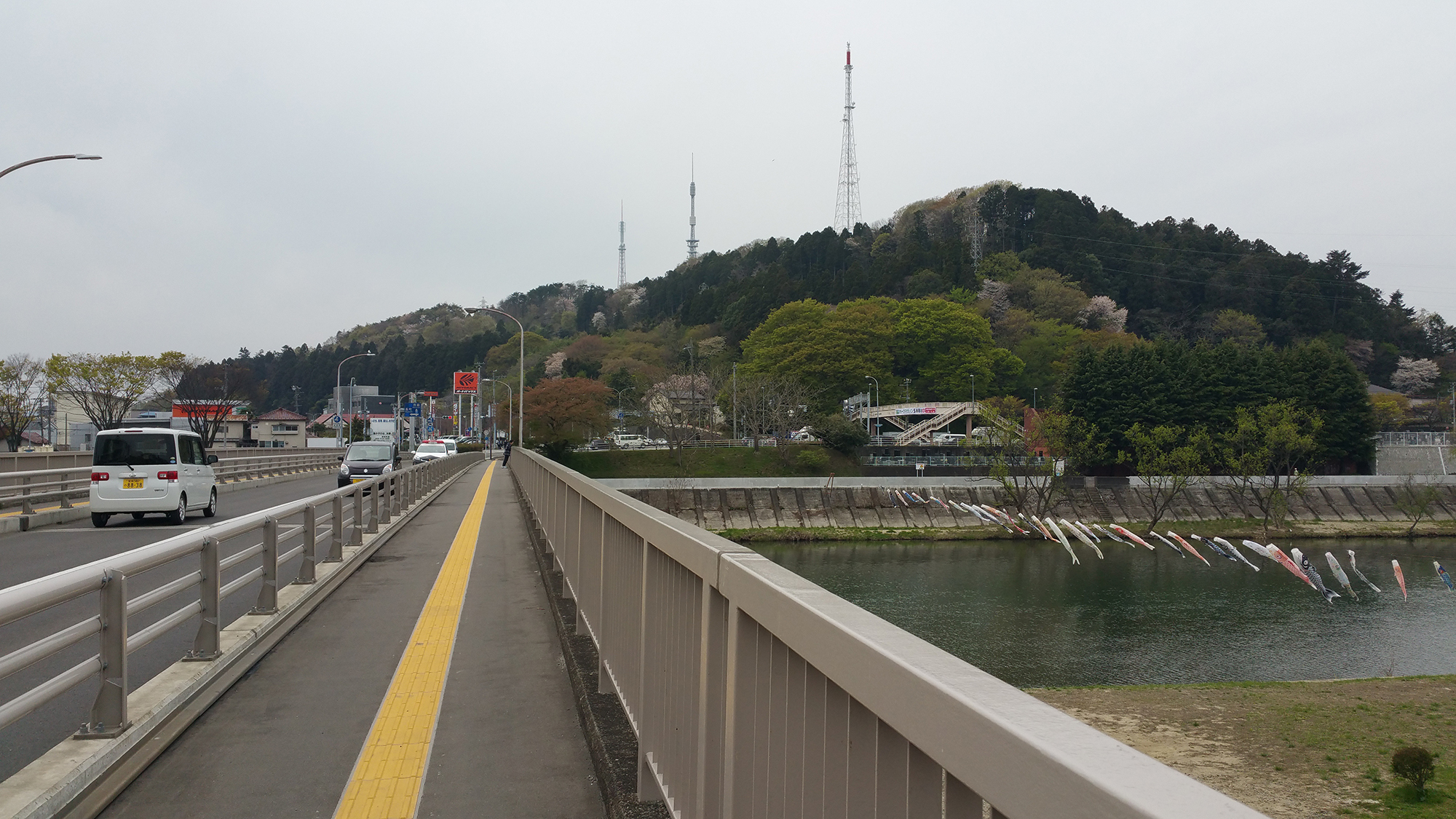 若林区側から太白区大年寺山方面